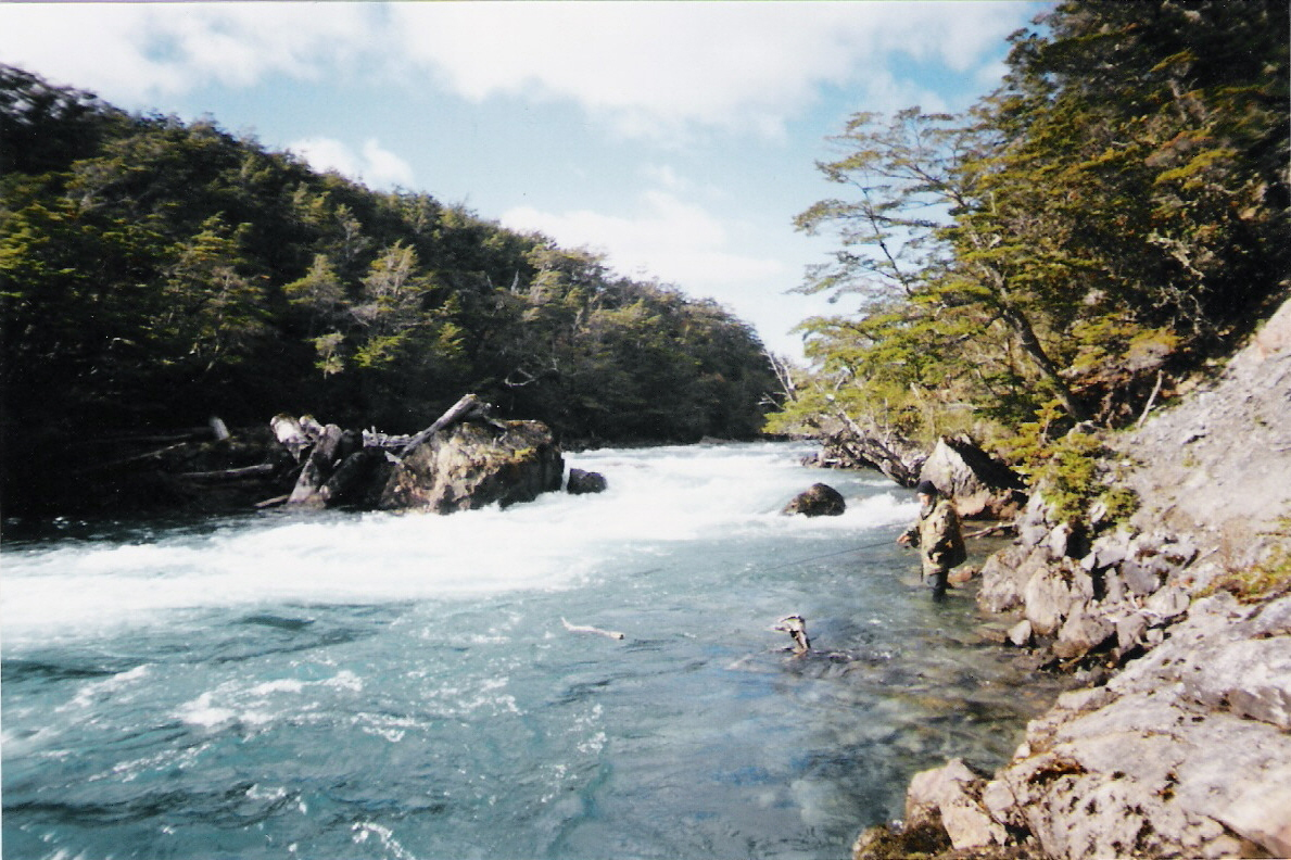 Cauce medio del Rio Azopardo en chile, que nace en el lago Fagnano y desemboca despues de 15 kilometros en el oceano pacifico